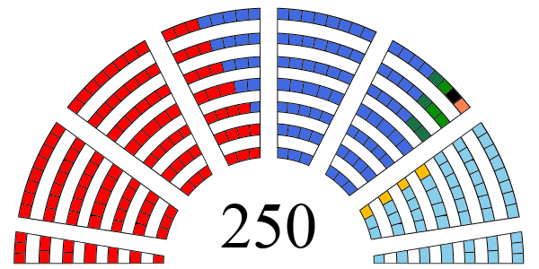 Parlamentarni izbori 1997 - raspodela mandata